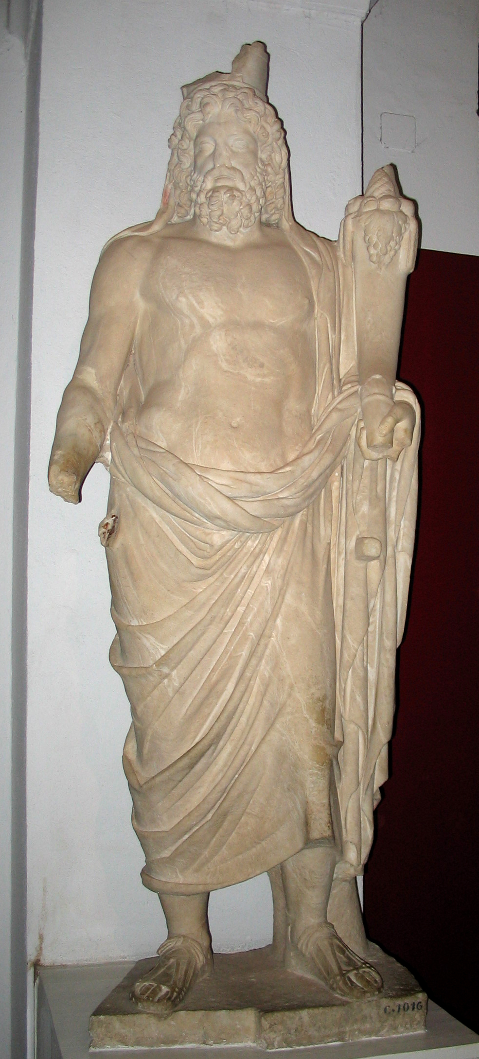 Saturno, scultura romana II sec. ex Museo nazionale del Bardo,Tunisi.